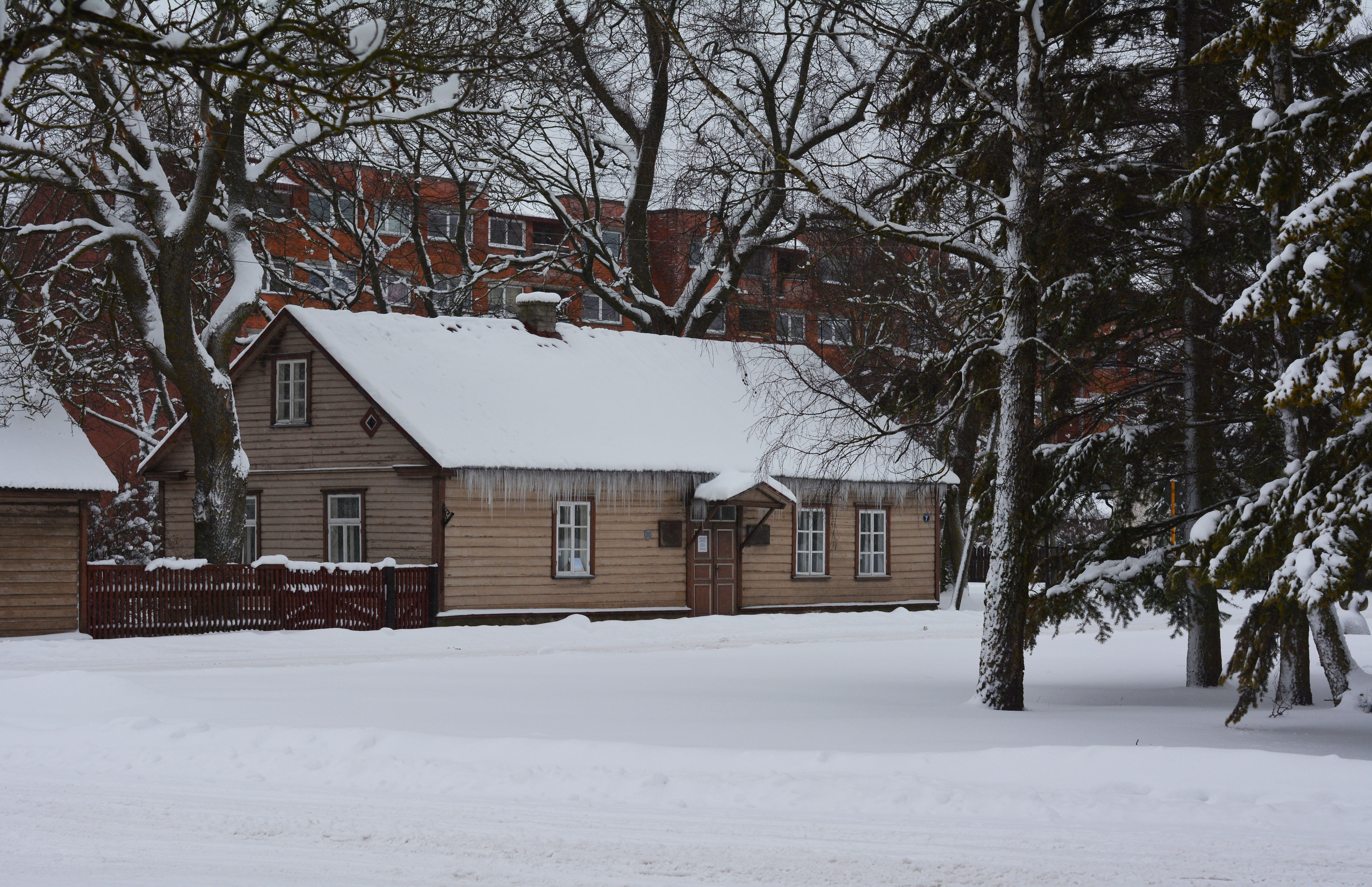 Kuressaare linn, Vallimaa tn 7